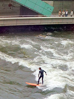 Flusssurfer auf der Mur unter der Grazer Hauptbrücke.